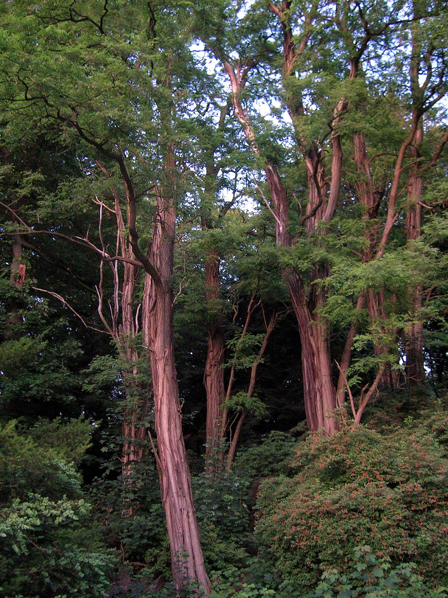 Dortmund, Rombergpark, Bäume in der Sumpflandschaft